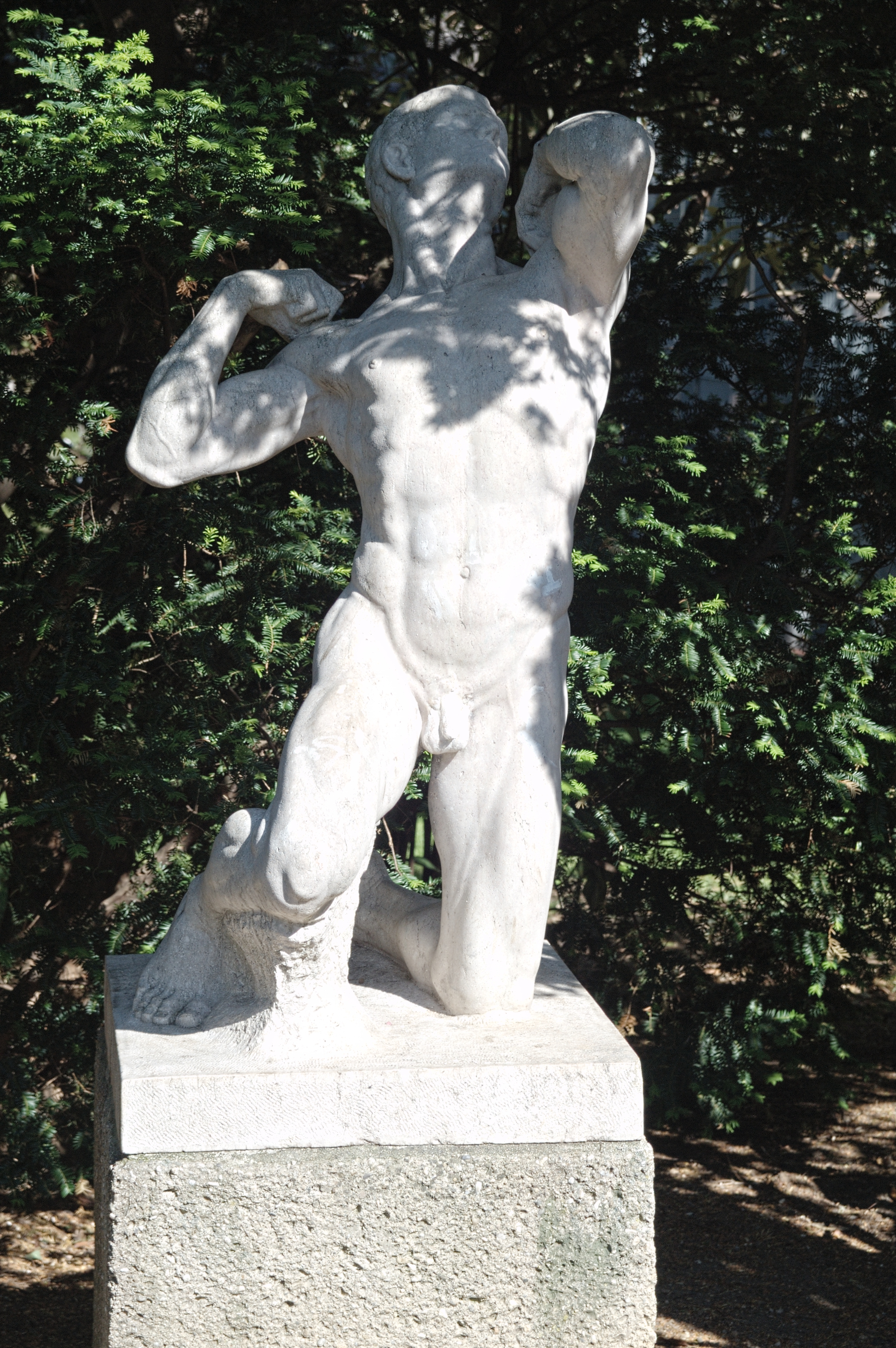 Figuren im Rathauspark